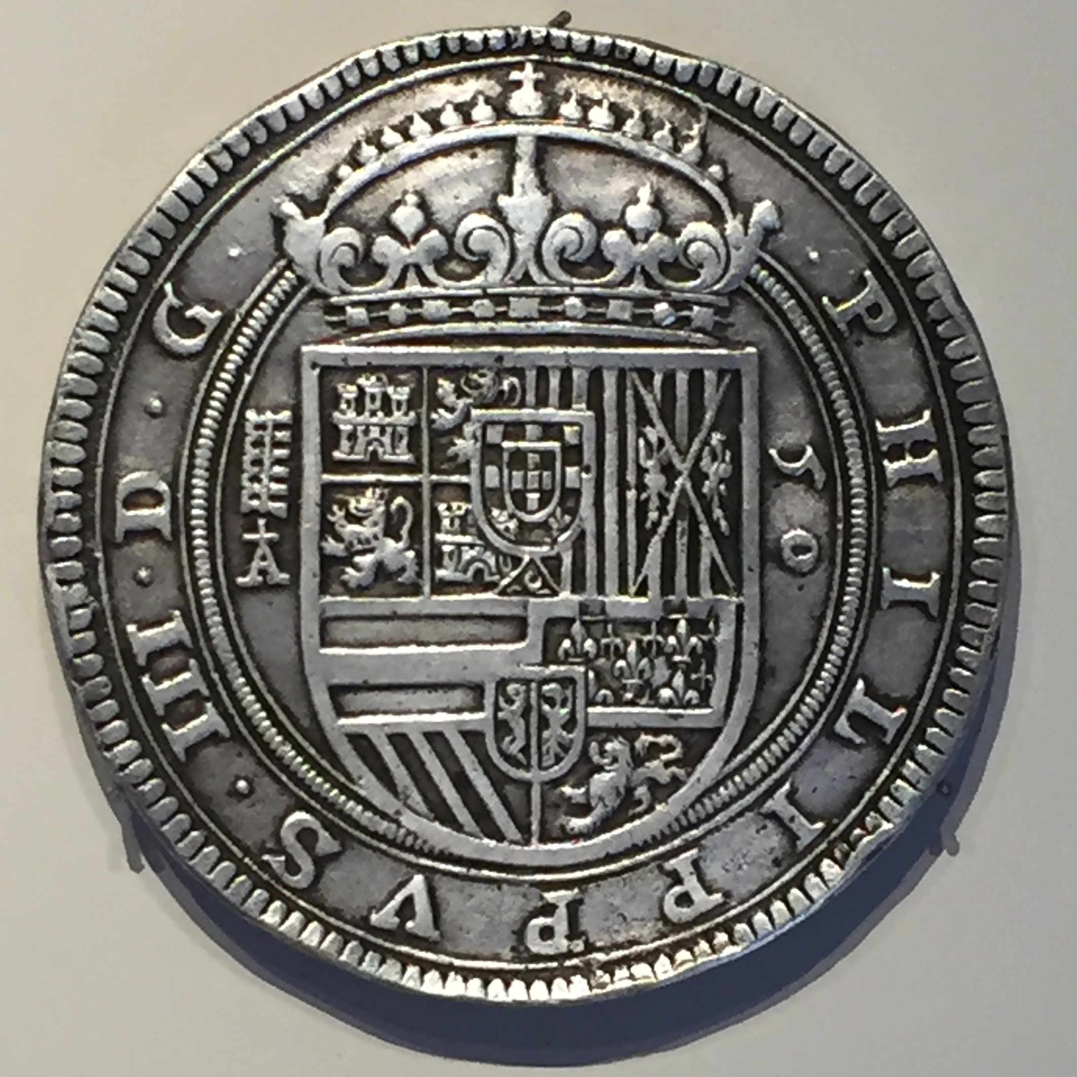 Moneda de plata de 50 reales acuñada en Segovia en 1617, durante el reinado de Felipe III de España.